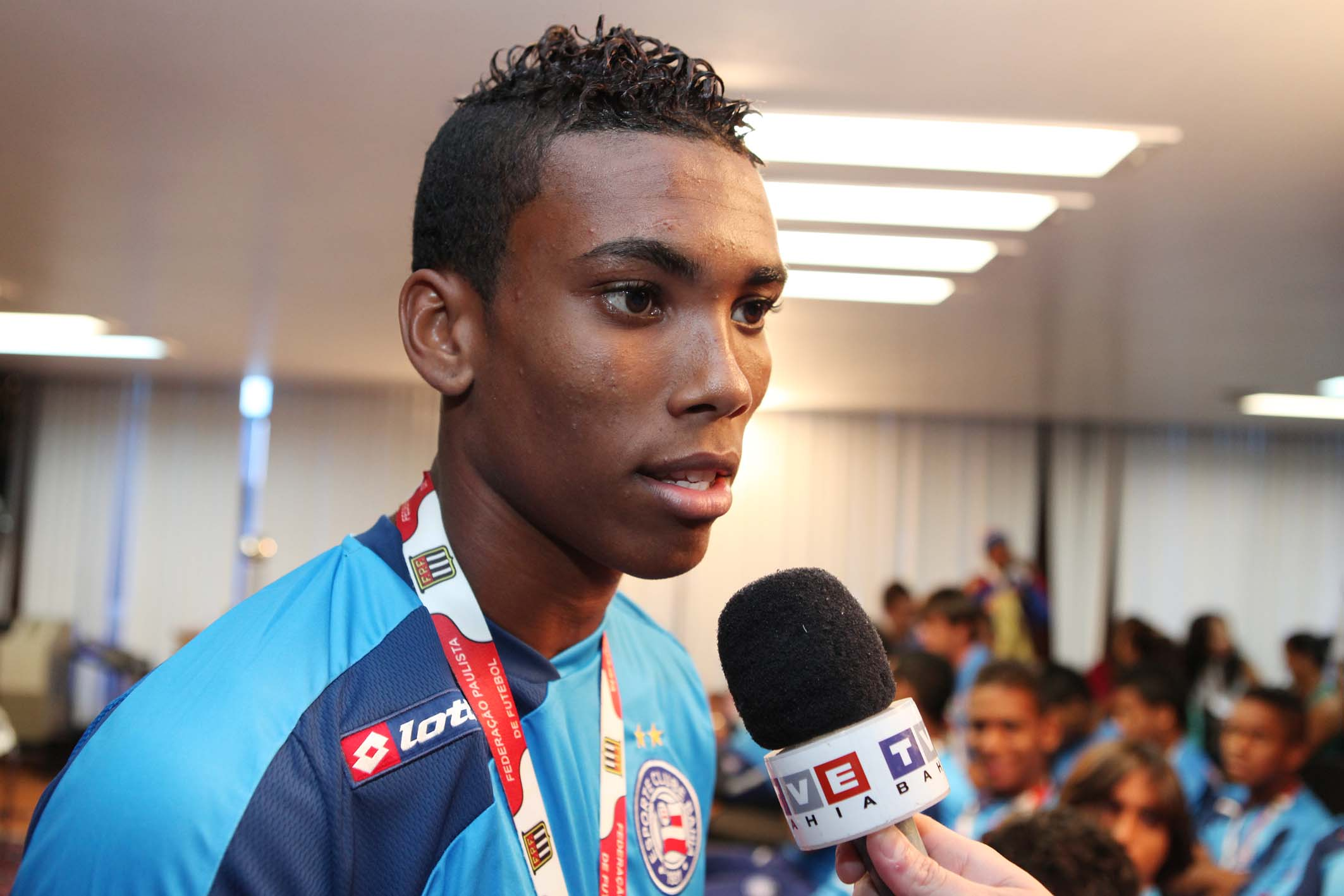 Governador recebe o Time Sub-20 do Bahia Vice-Campeão da Taça São Paulo. Na foto: Madson Ferreira, 19 anos, lateral direito